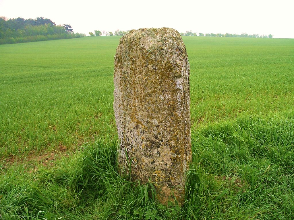 Menhir des Planches à Amblie (Calvados)